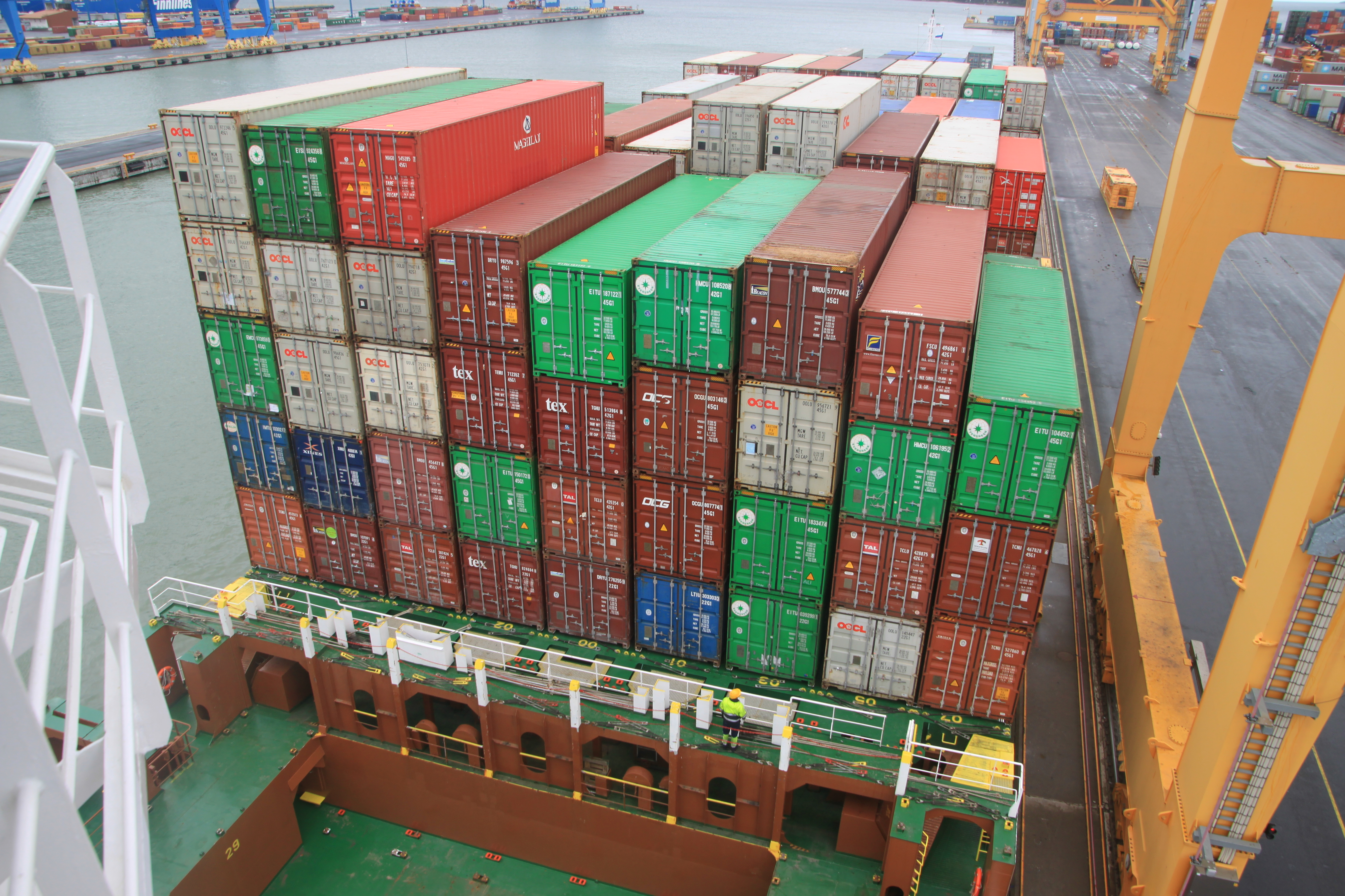 Container an Bord der HEINRICH SCHEPERS